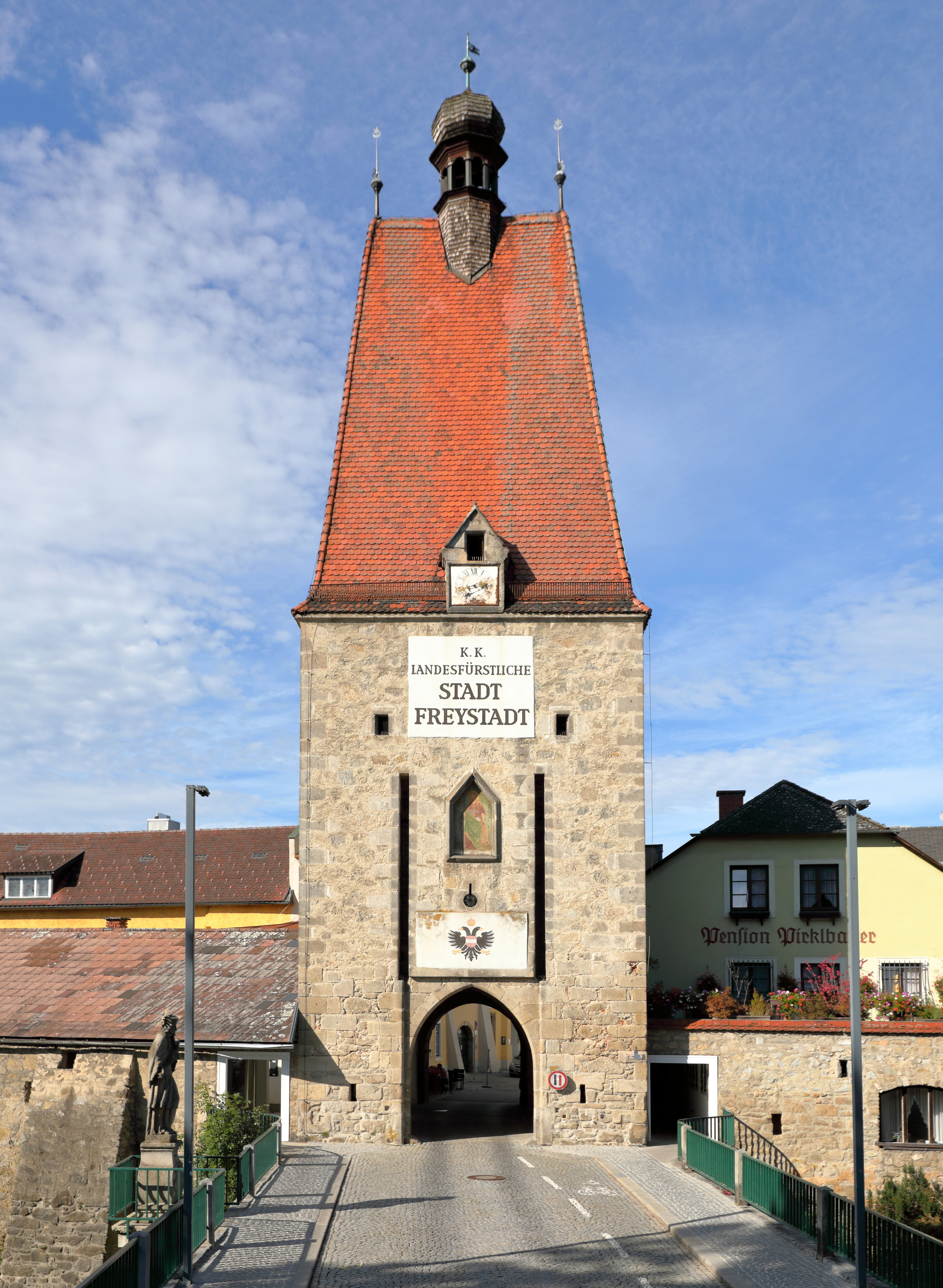 Das Linzertor in der oberösterreichischen Stadtgemeinde Freistadt. Das Tor zählt mit 28 Metern Höhe zu den mächtigsten Tortürmen Mitteleuropas und gilt als Wahrzeichen Freistadts. Es ist Teil der gut erhaltenen Stadtbefestigung. Ende des 15. Jahrhunderts wurde es zu seiner heutigen Form von dem Freistädter Baumeister Mathes Klayndl umgebaut. Den barocken Dachreiter mit Zwiebelhelm fügte man Anfang des 17. Jahrhunderts hinzu.